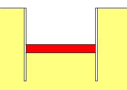 Plaatje van een bouwkuip met onderwaterbeton, getekend door Wikipediagebruiker: GeeKaa 24 aug 2005 09:32 (CEST)